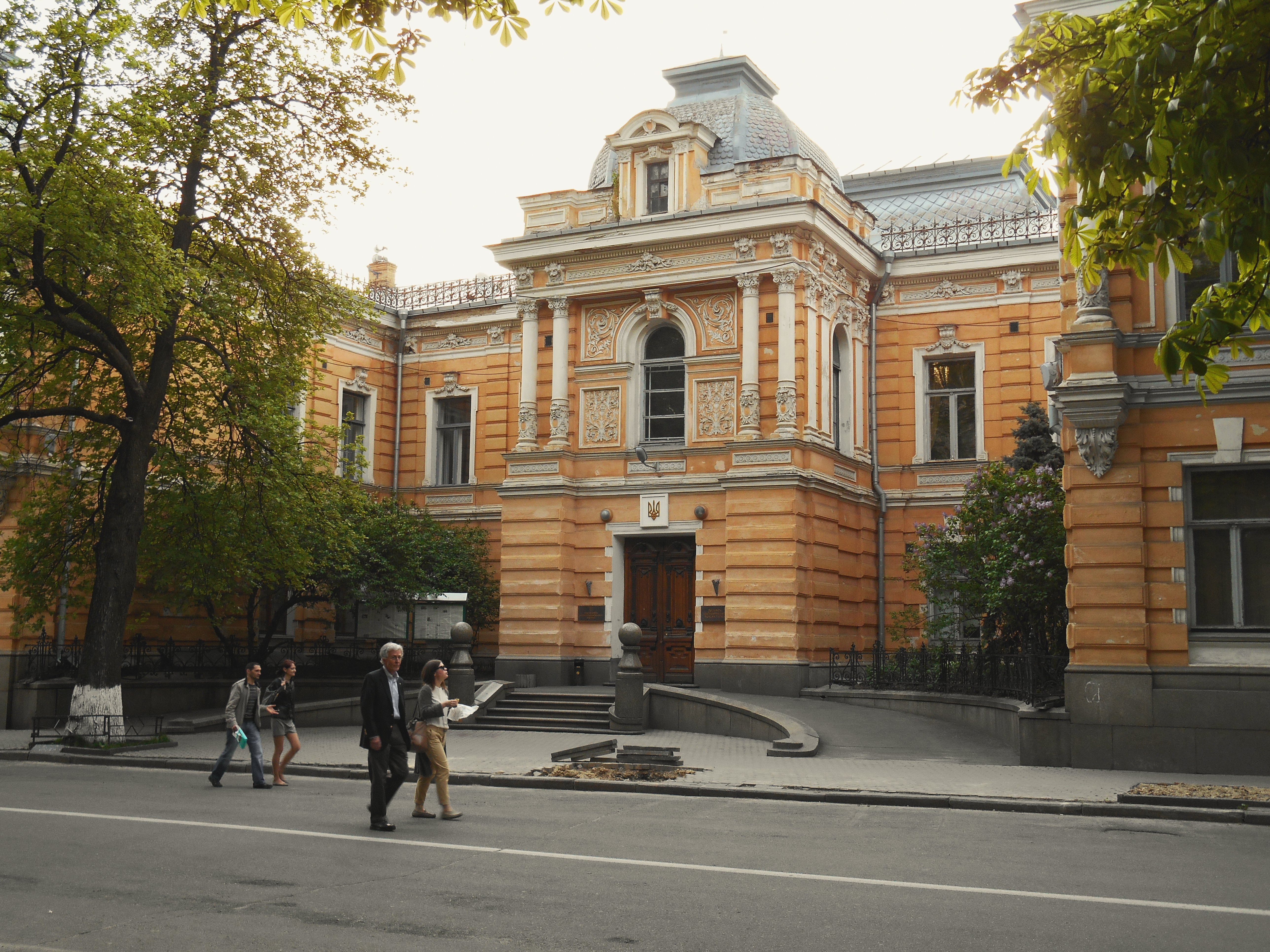 Особняк С. Лібермана, Київ, Банкова вул., 2